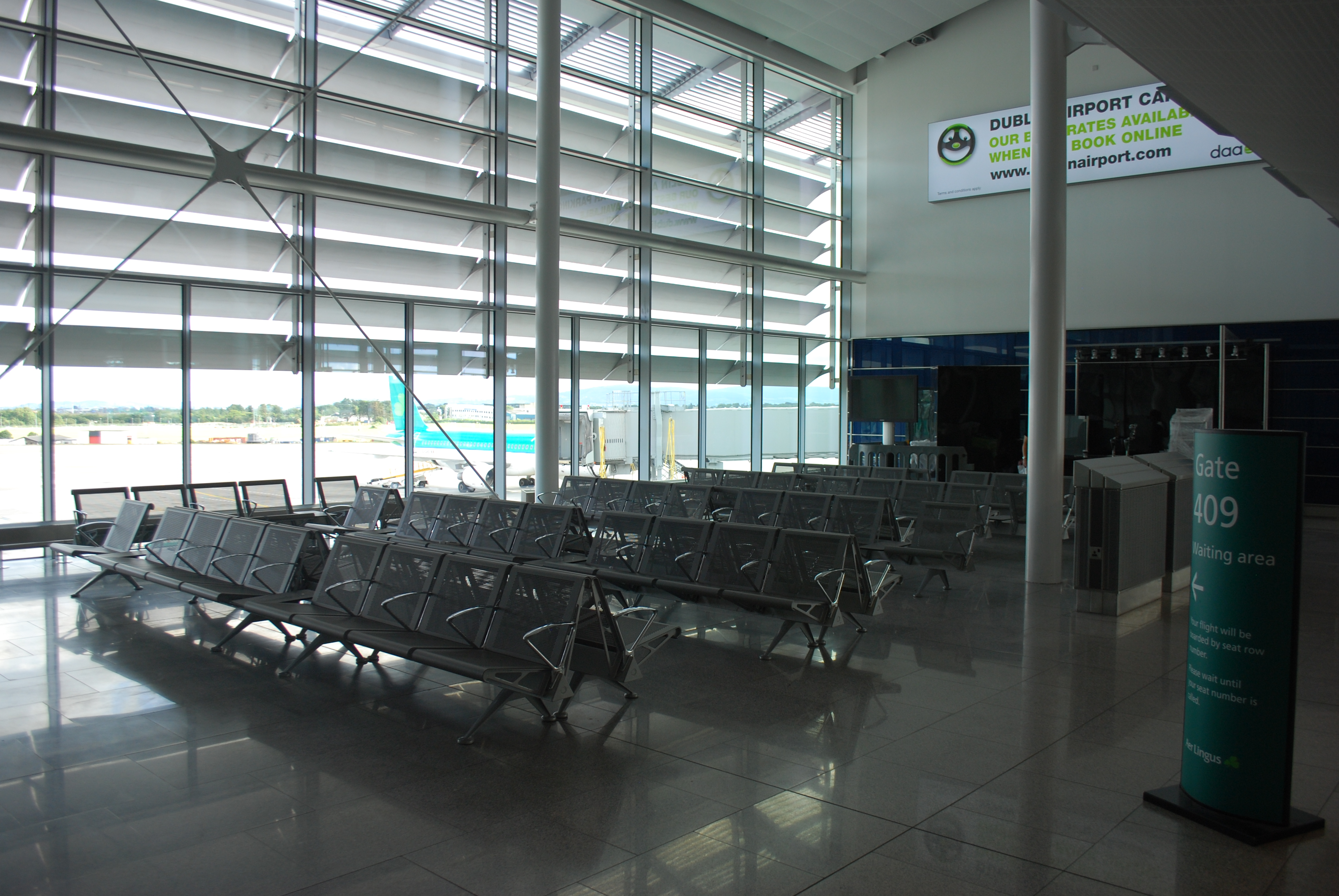 Vue du Terminal 2 de l'aéroport de Dublin.